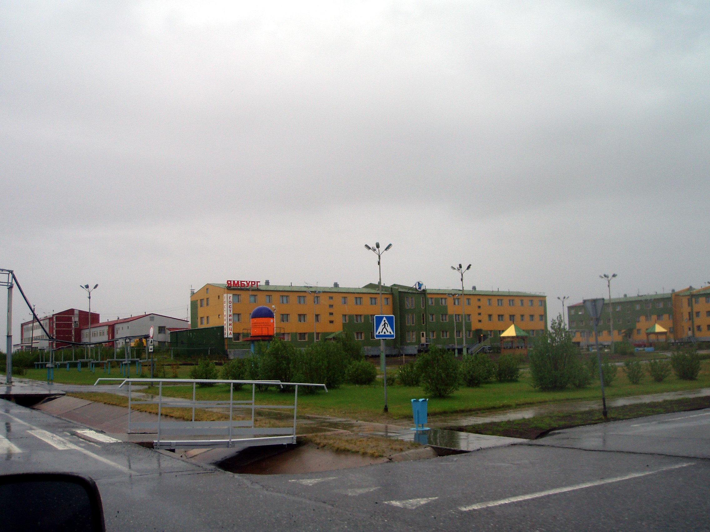 Zentrum von Jamburg